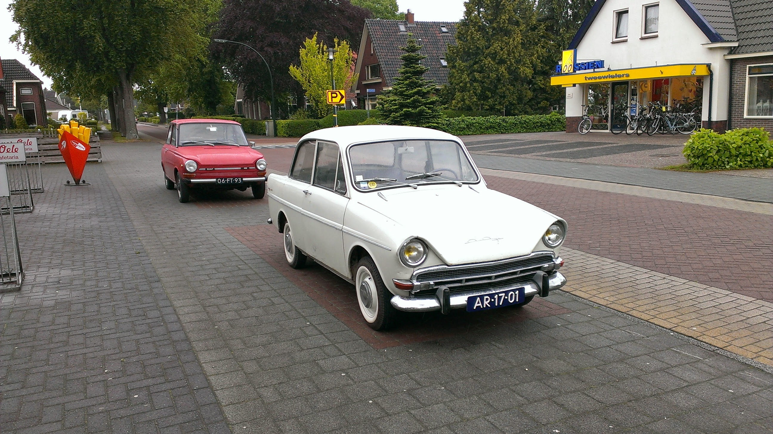 DAF Daffodil 30 met op de achtergrond een DAF 46